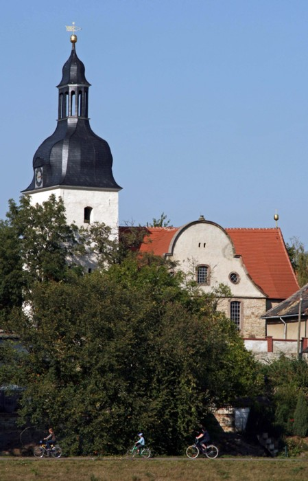 Sankt-Michaelis-Kirche Raßnitz Ortsteil Weßmar, Sicht von Süden über die Weiße Elster hinweg, mit Elster-Radweg